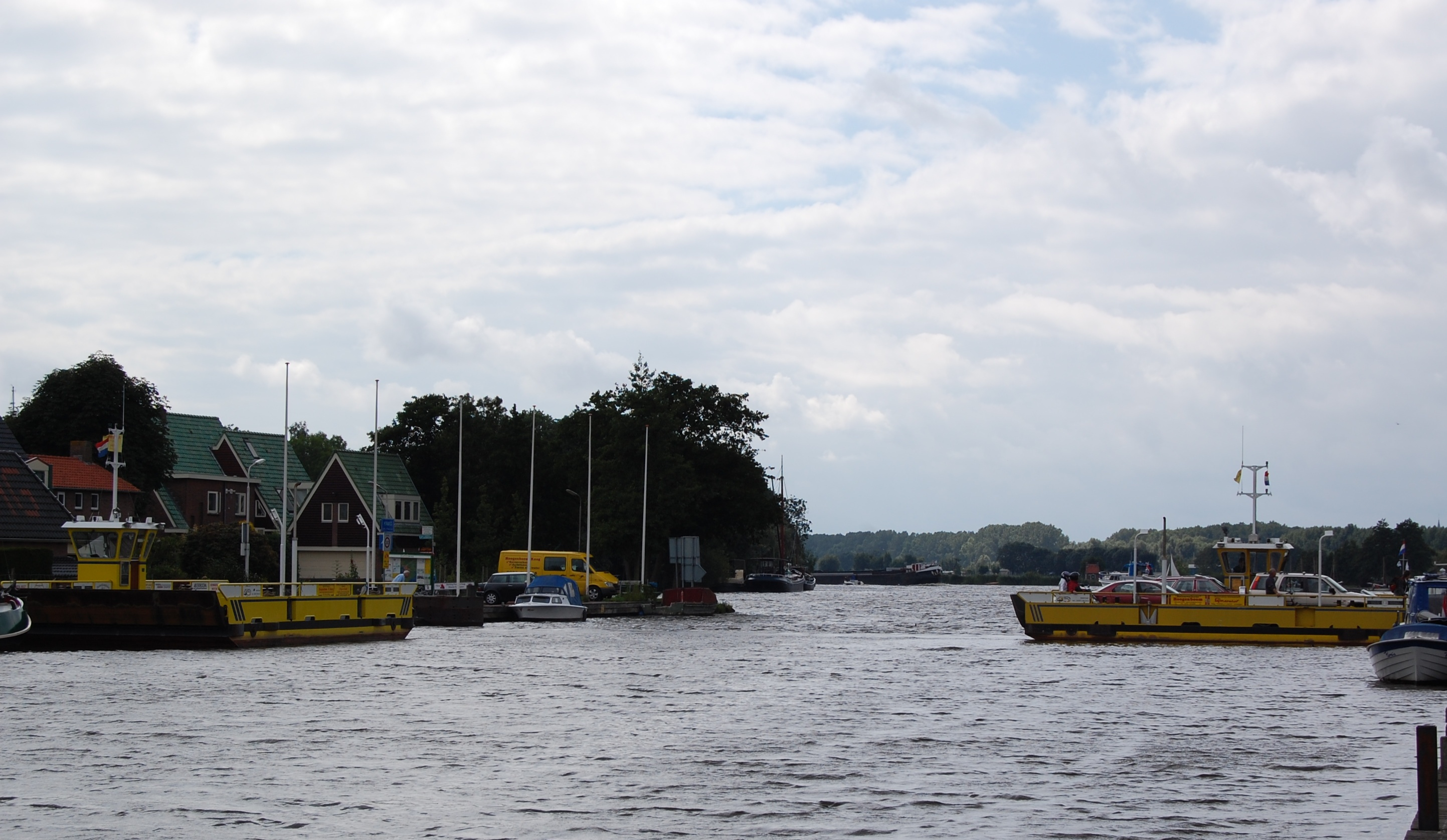 Het pontje in Buitenkaag over de Ringvaart-Haarlemmermeer.